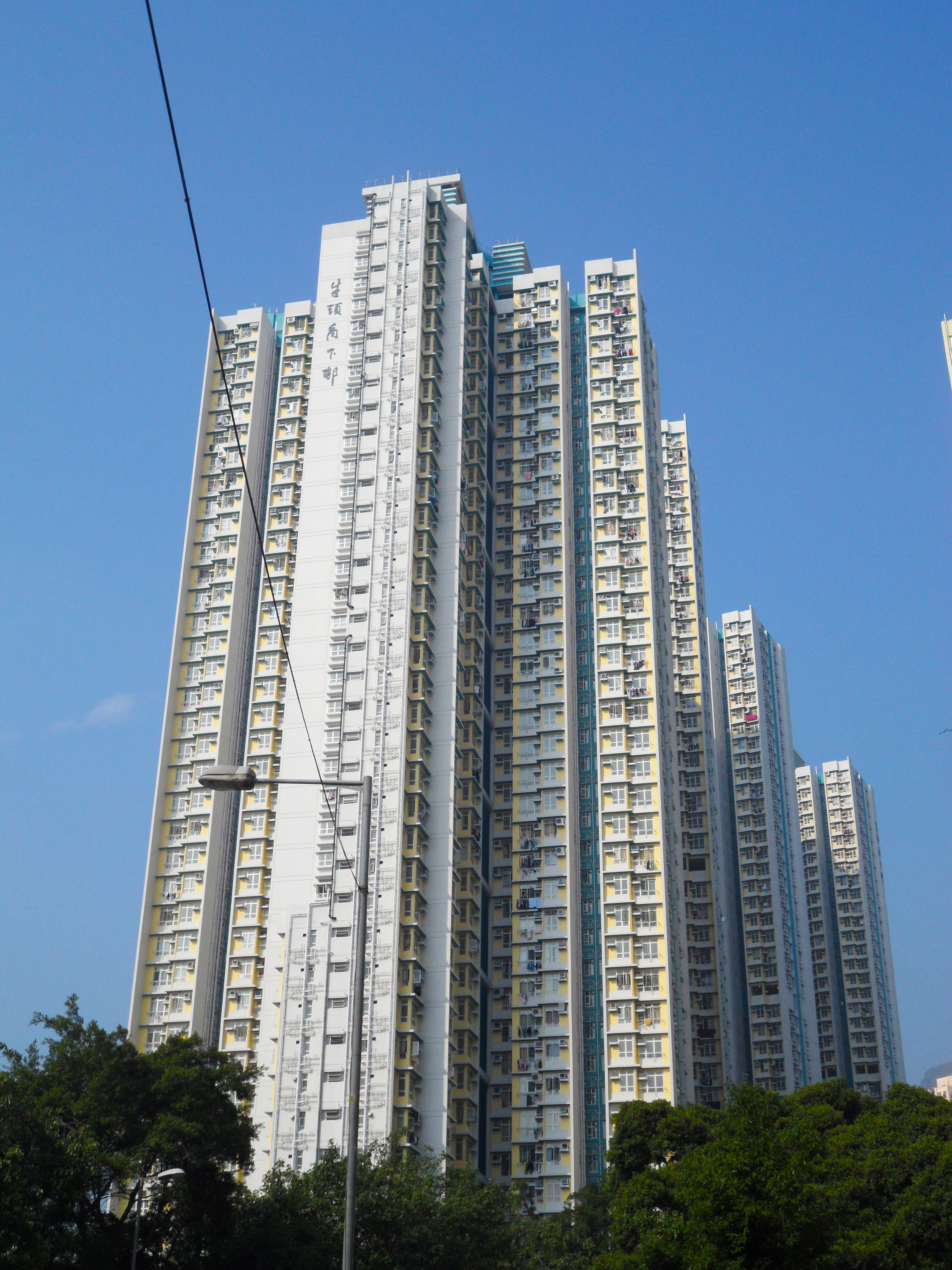 從牛頭角上邨外看牛頭角下邨